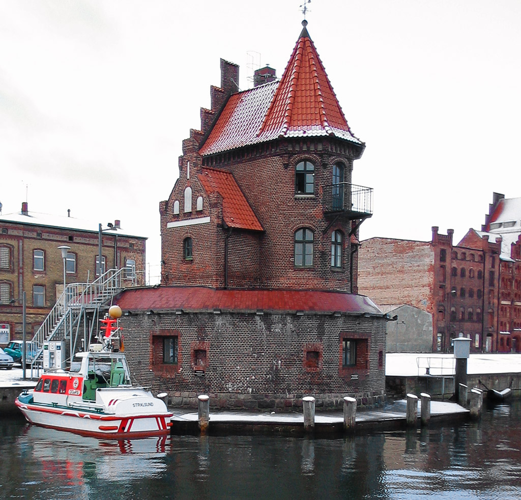 Beschreibung: Seenotrettungsboot (SRB) Stralsund neben dem Hafen- und Seemannsamt Stralsund Fotograf: Darkone, 23. Januar 2005 Object location54° 18′ 55.69″ N, 13° 05′ 55.28″ E